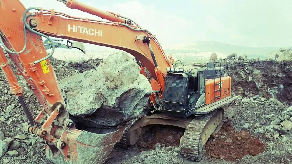 מחפר זחלי